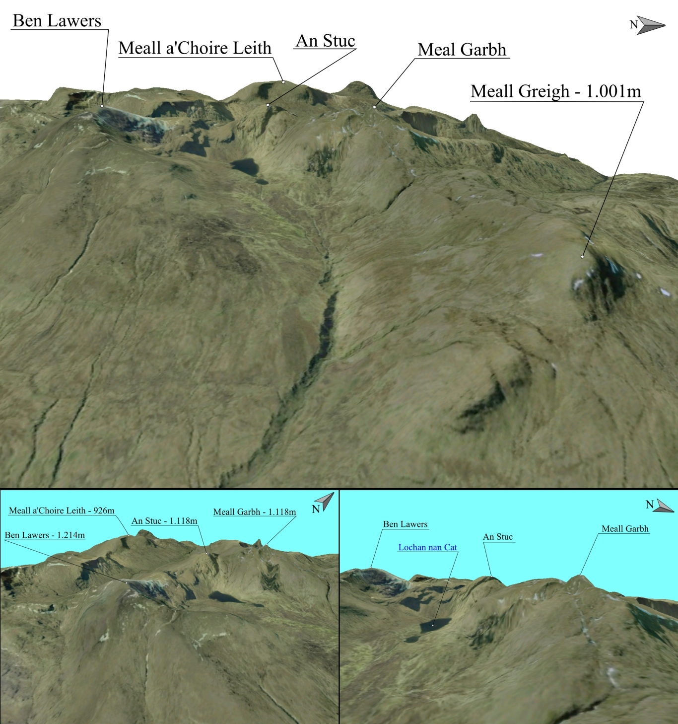 Prelucrare 3D pentru Meall Garbh, An Stuc, Ben Lawers - Scotia.